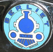 altes Emblem vom Berliet LKW